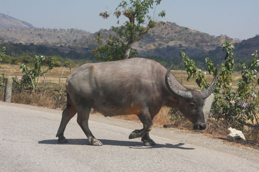 Búfalo em Laga, Timor-Leste